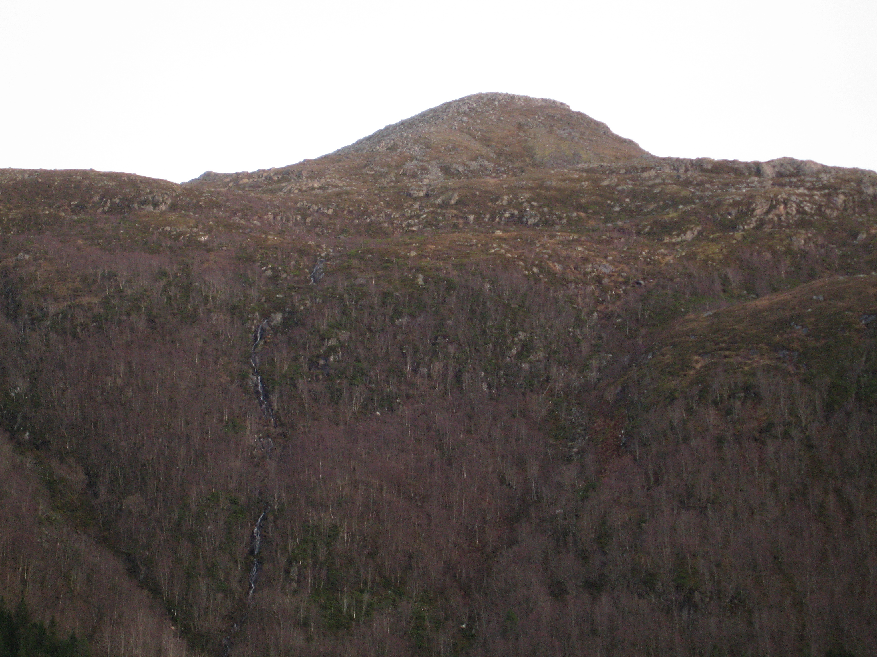 Stokknoken